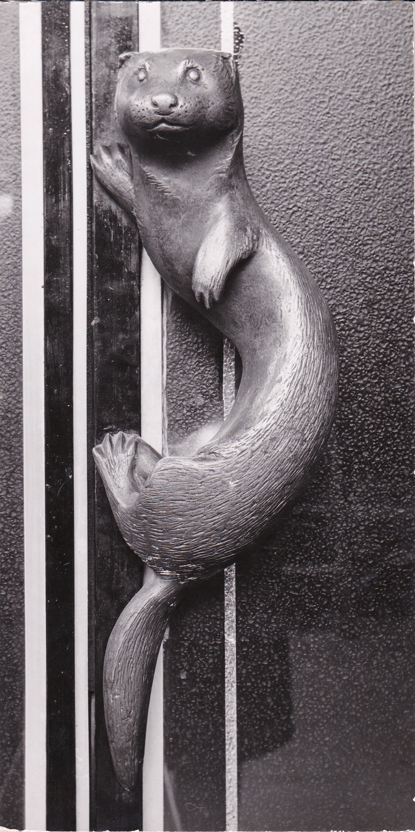 Nerz, Design Max Kratz. Türgriff der Firma Edelpelze Berger, Bronze und Neusilber. Je 2 Stück waren an den Eingangstüren aller Filialen (Berlin, Hamburg, Timmendorfer Strand). Das Künstlerehepaar Gerda und Max Kratz waren Freunde des Ehepaars Otto Berger.